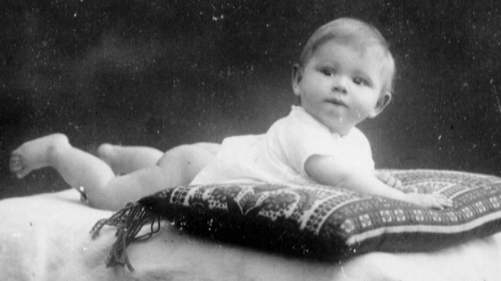 Ingeborg Syllm in der Kindheit.